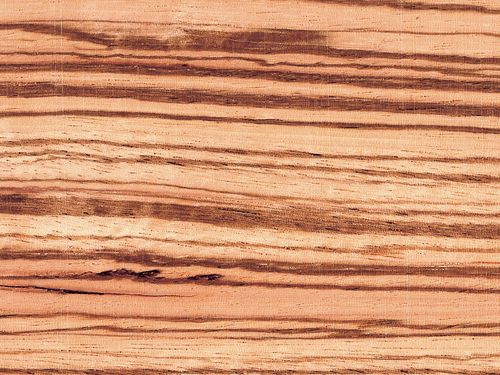 Zebrano - okleina